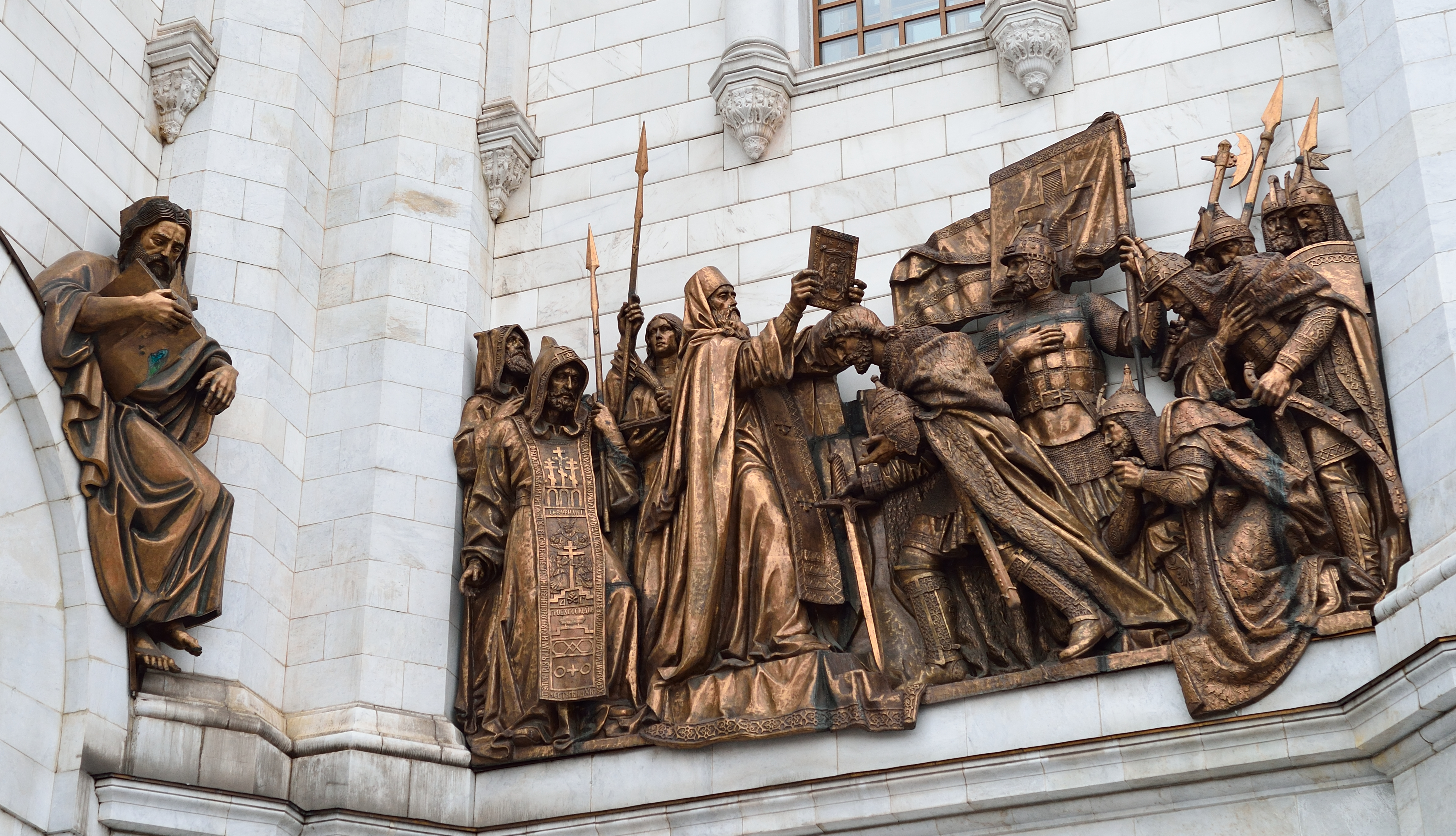 Фрагмент бронзовых скульптурных медальонов в тимпанах кокошников (на фронтоне) храма Христа Спасителя